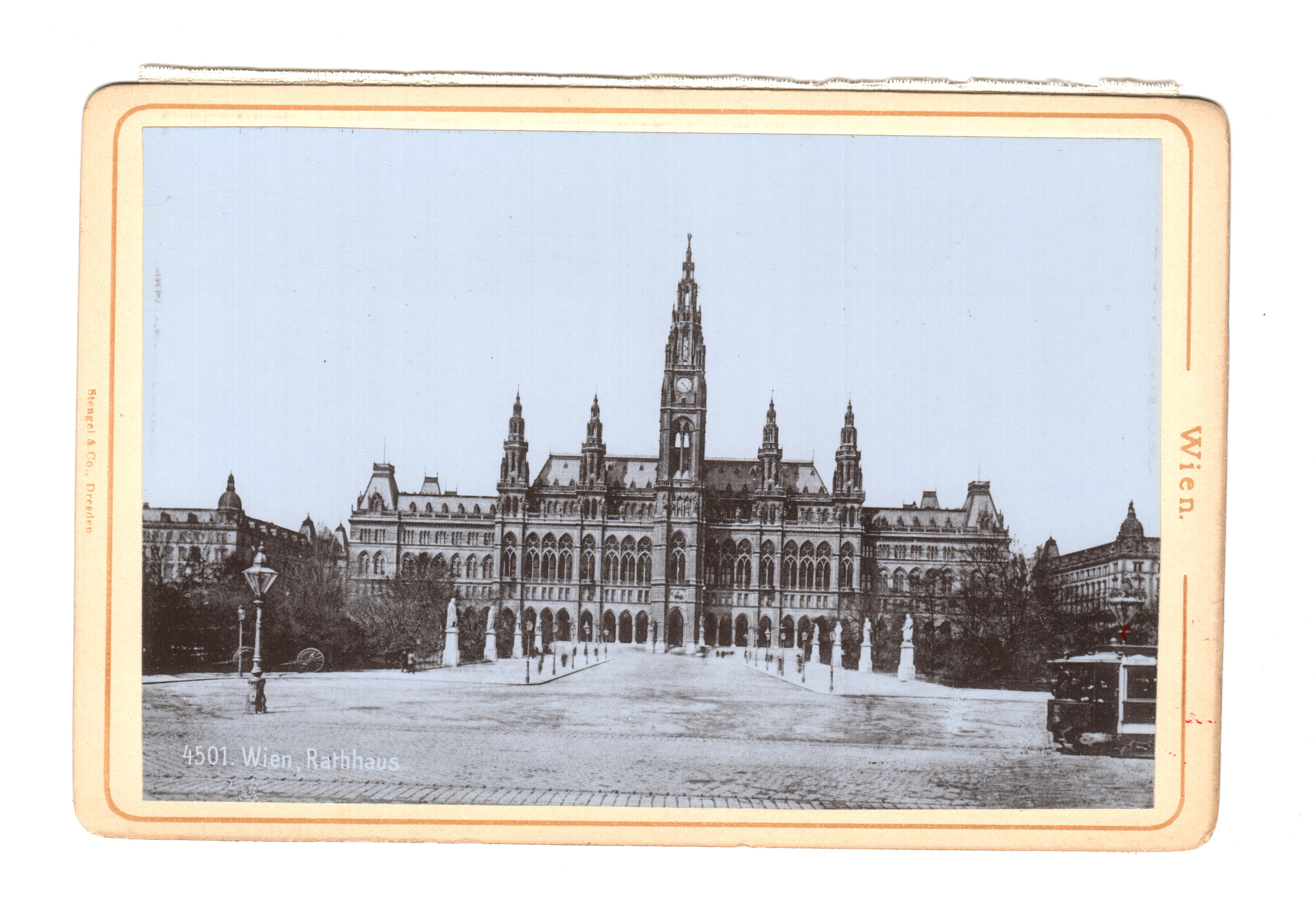 Osztrák-Magyar Monarchia, Bécs. Ismeretlen fényképész. This work is in the public domain in its country of origin and other countries and areas where the copyright term is the author's life plus 70 years or fewer. You must also include a United States public domain tag to indicate why this work is in the public domain in the United States. Note that a few countries have copyright terms longer than 70 years: Mexico has 100 years, Jamaica has 95 years, Colombia has 80 years, and Guatemala and Samoa have 75 years. This image may not be in the public domain in these countries, which moreover do not implement the rule of the shorter term. Côte d'Ivoire has a general copyright term of 99 years and Honduras has 75 years, but they do implement the rule of the shorter term. Copyright may extend on works created by French who died for France in World War II (more information), Russians who served in the Eastern Front of World War II (known as the Great Patriotic War in Russia) and posthumously rehabilitated victims of Soviet repressions (more information). This file has been identified as being free of known restrictions under copyright law, including all related and neighboring rights. Fényképalbum 16 fényképéből. A fényképek mérete 9,5 cm x 14,5 cm. ©© Megjelent Creative Commons alatt a Metapolisz sorozatban. A Metapolisz sorozat valamennyi képe és filmje Creative Commons alatti valamint kereskedelmi - for profit - célra is felhasználható. Ajánlott hivatkozás: Derzsi Elekes Andor: Metapolisz DVD line ©© Published under Creative Commons in the Metapolisz DVD line. All of the photos and vids in the Metapolisz DVD line are under Creative Commons and can be used even for commercial – for profit – purposes. Recommended Citation Derzsi Elekes Andor: Metapolisz DVD line